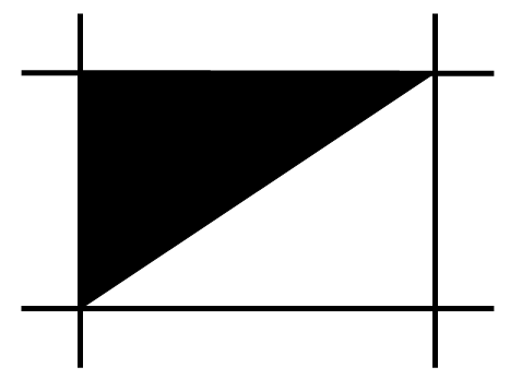 Условное обозначение шурфа на инженерно-геологических картах согласно ГОСТ 21.302-2013